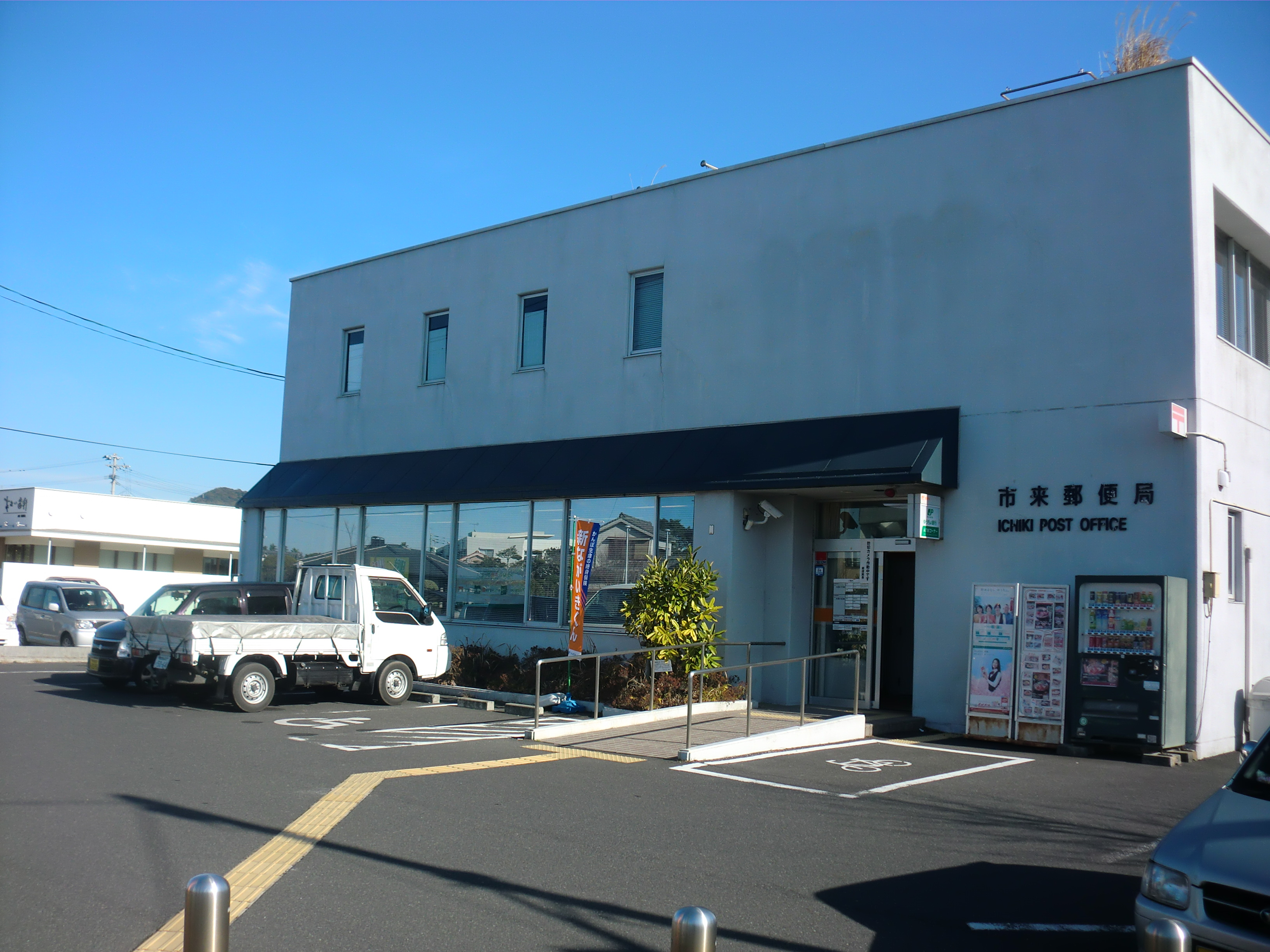 いちき串木野市にある市来（いちき）郵便局